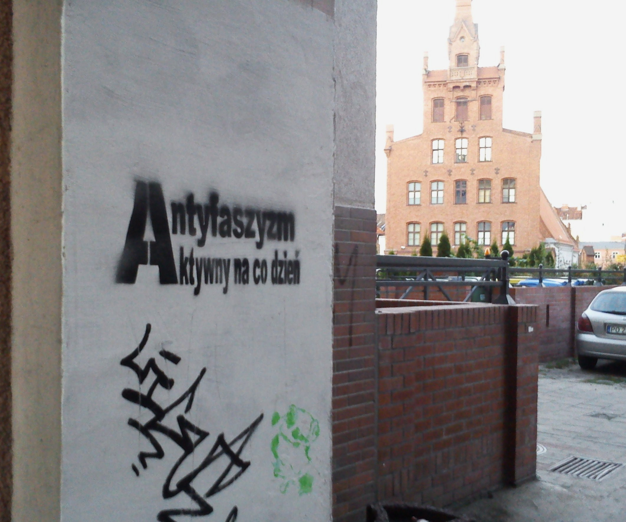 Poznań, pl. Wielkopolski.